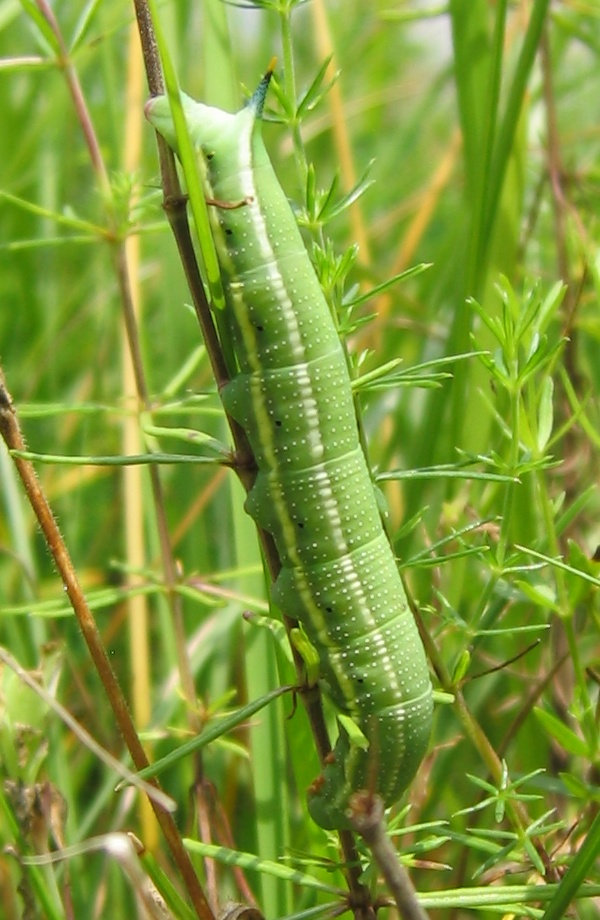 Macroglossum stellatarum